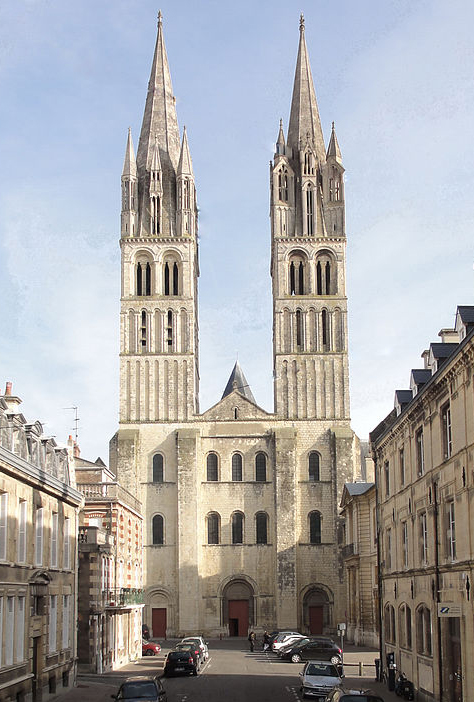 Mairie de caen Calvados